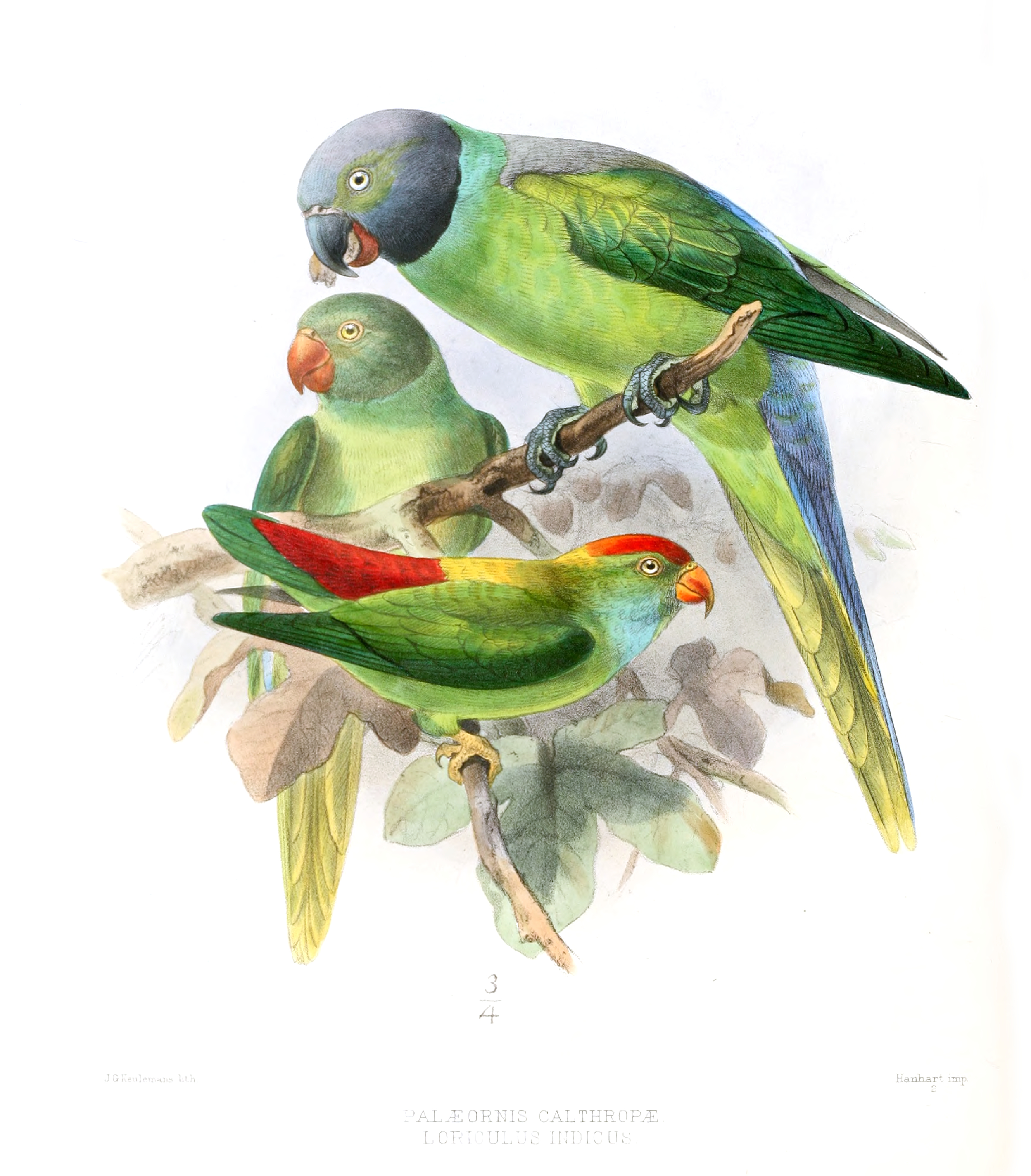 Psittacula calthropae, Loriculus vernalis